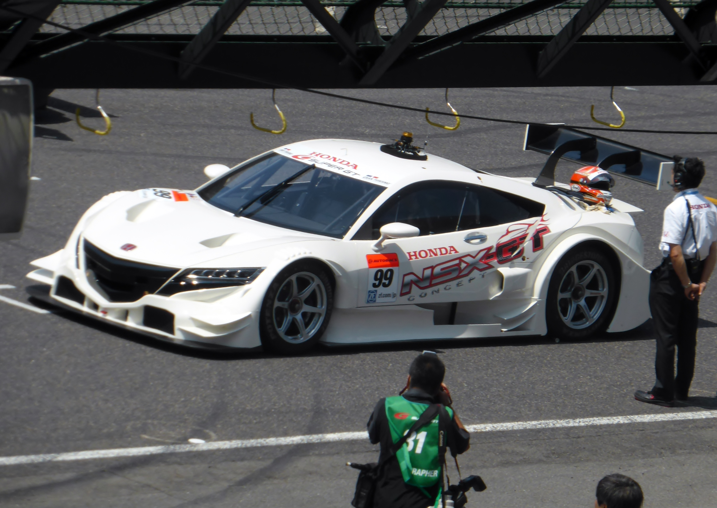 第42回インターナショナルポッカサッポロ1000kmでデモ走行を行うホンダ・NSXの2014年規定GT500車両を撮影。後日みんカラにもアップロード予定